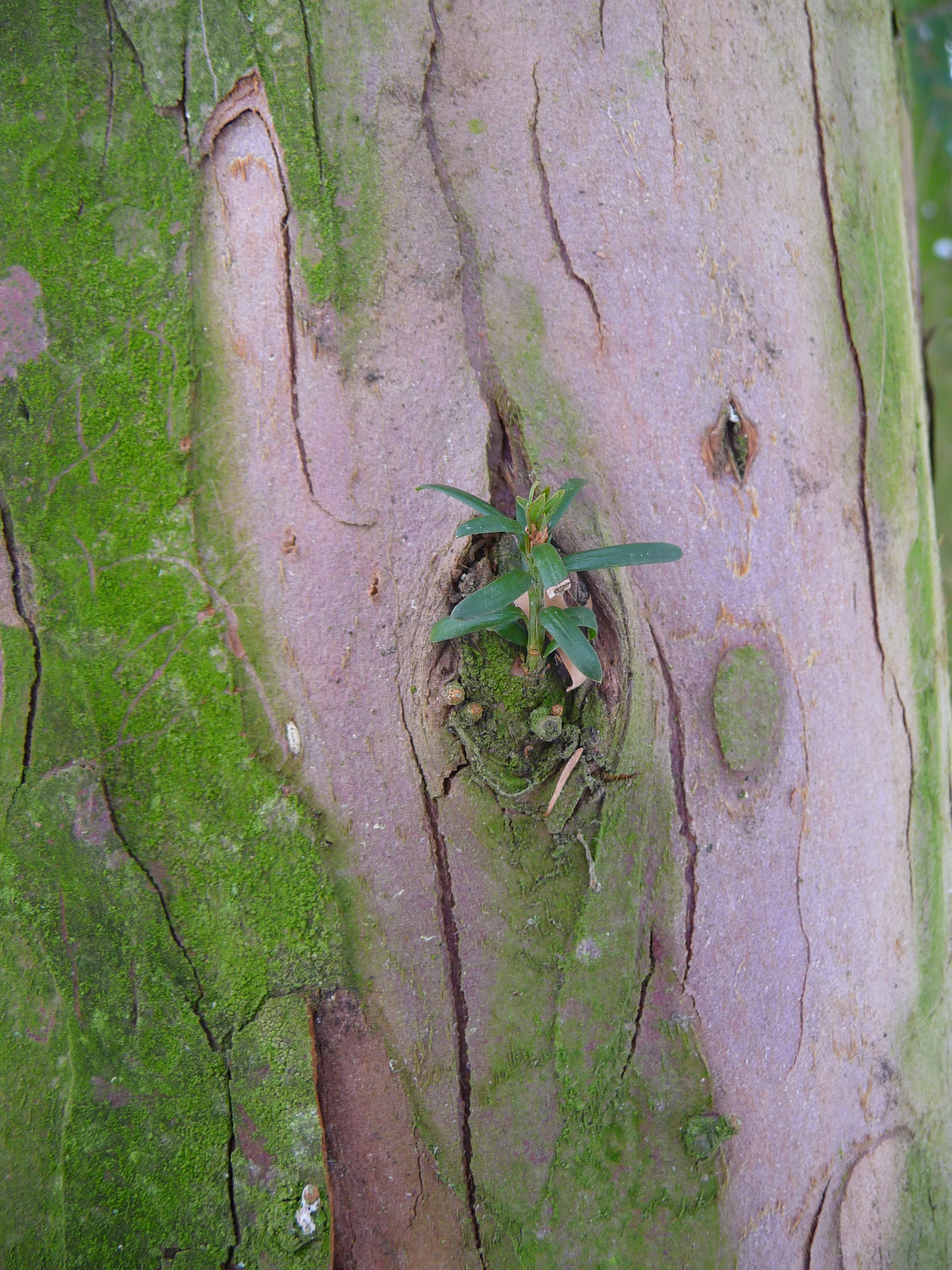 Stamm und Spross einer Eibe, fotografiert in Heidelberg (Baden-Württemberg, Deutschland)